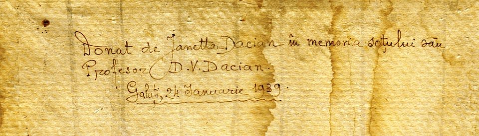 Textul olograf de pe verso al tabloului cu portretul lui Alexandru Ioan Cuza